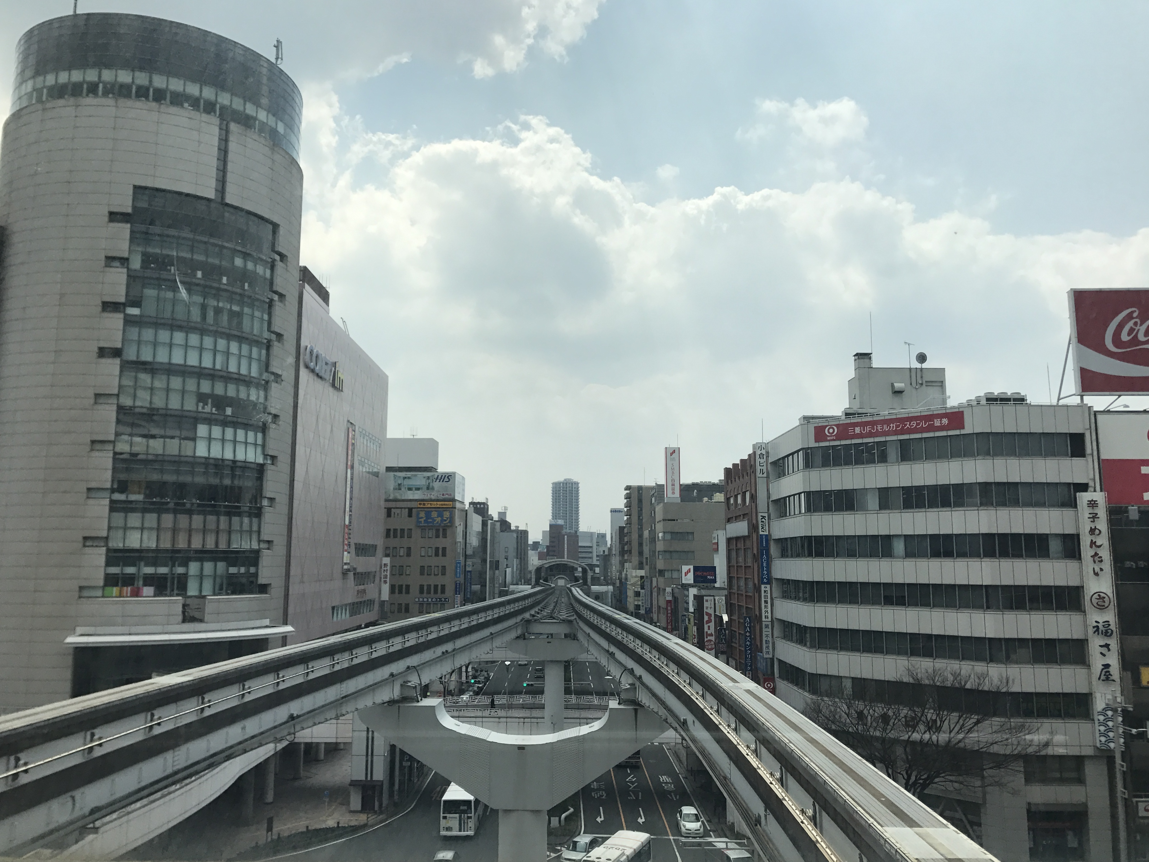 小倉駅の北九州モノレールホームより望む平和通方面